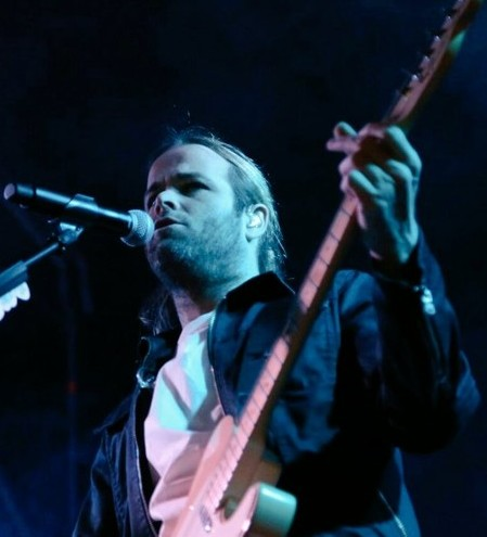 Benjamín Amadeo en la segunda edición del evento musical “Estrellas en Calle Corrientes” en 2017.